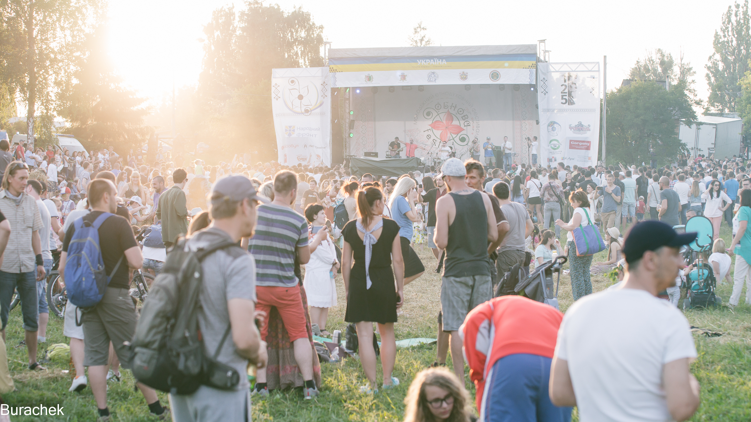 Головна сцена. Обнова-фест 2016 (автор А.Бурачек)